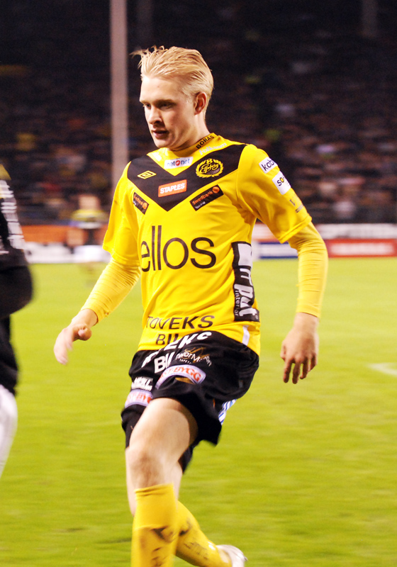 Johan Larsson